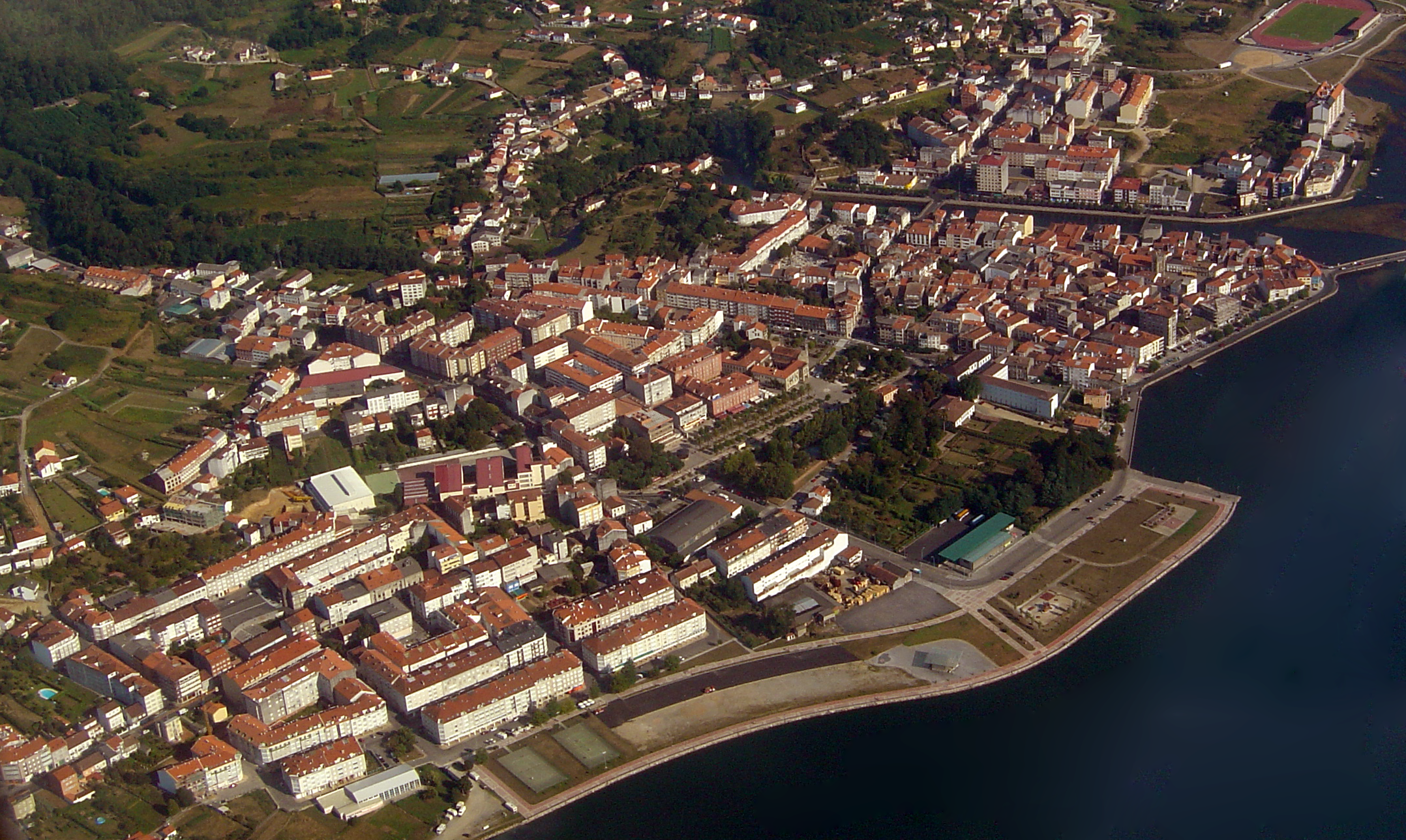 Villa de Noia, España.